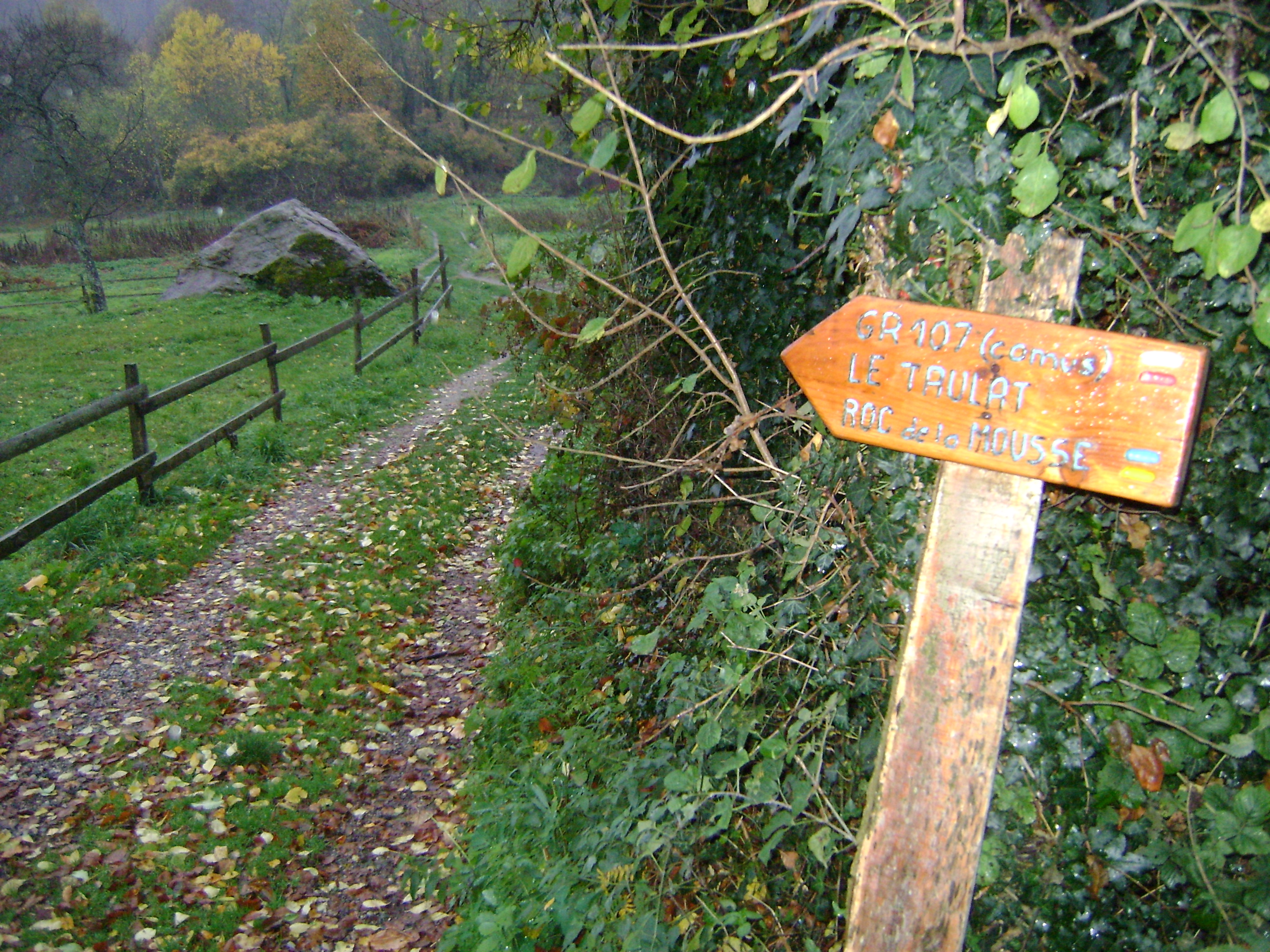 Montségur (Ariège, Francia), cartel de inicio, 02-11-09